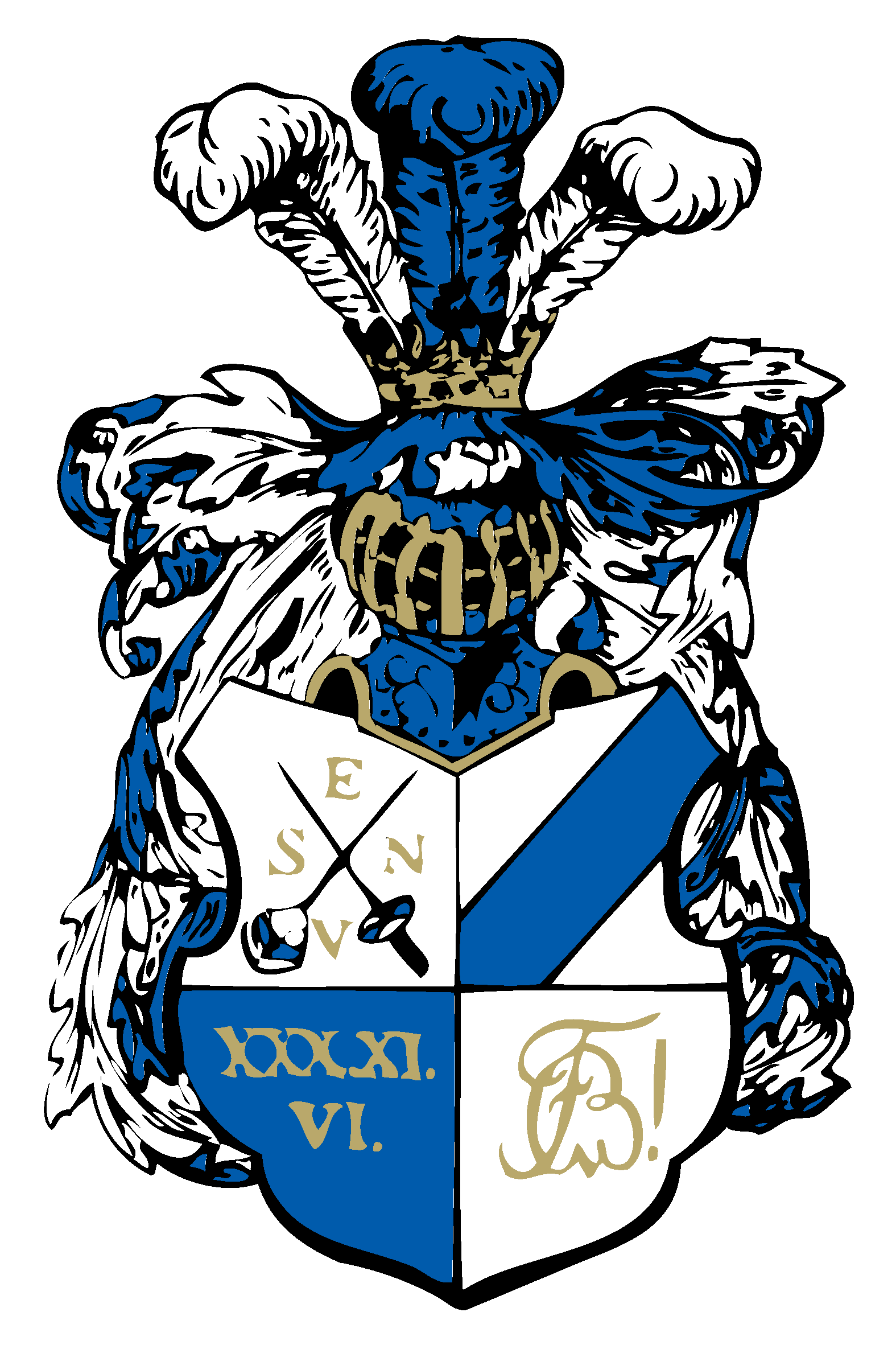 Vollwappen des Corps Bavaria München